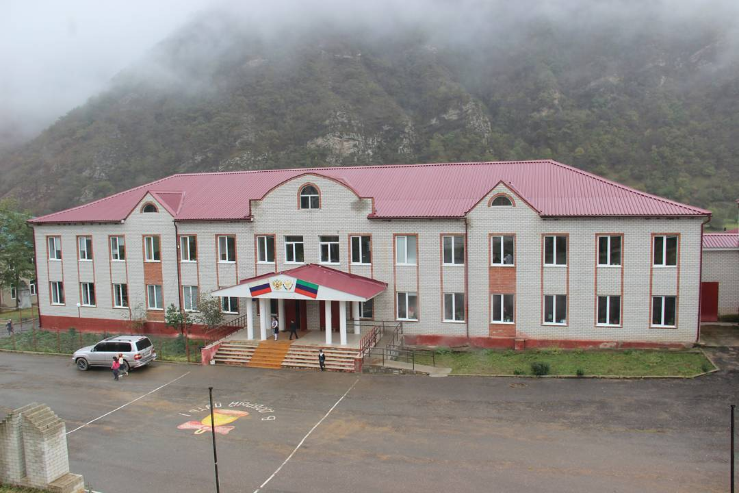 СОШ Хоредж Хивский район